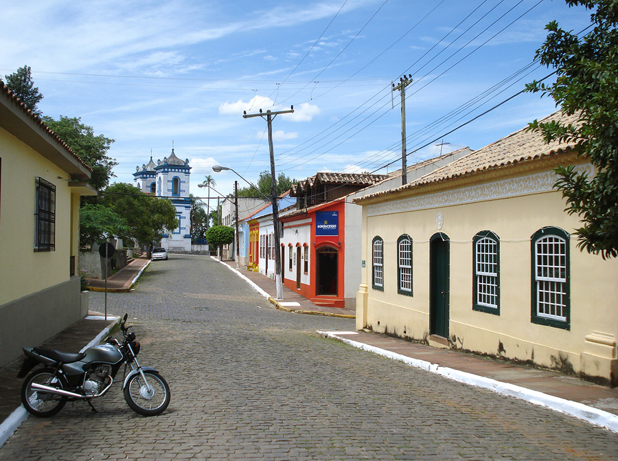 Casario típico do centro histórico de Triunfo, Rio Grande do Sul, Brasil.